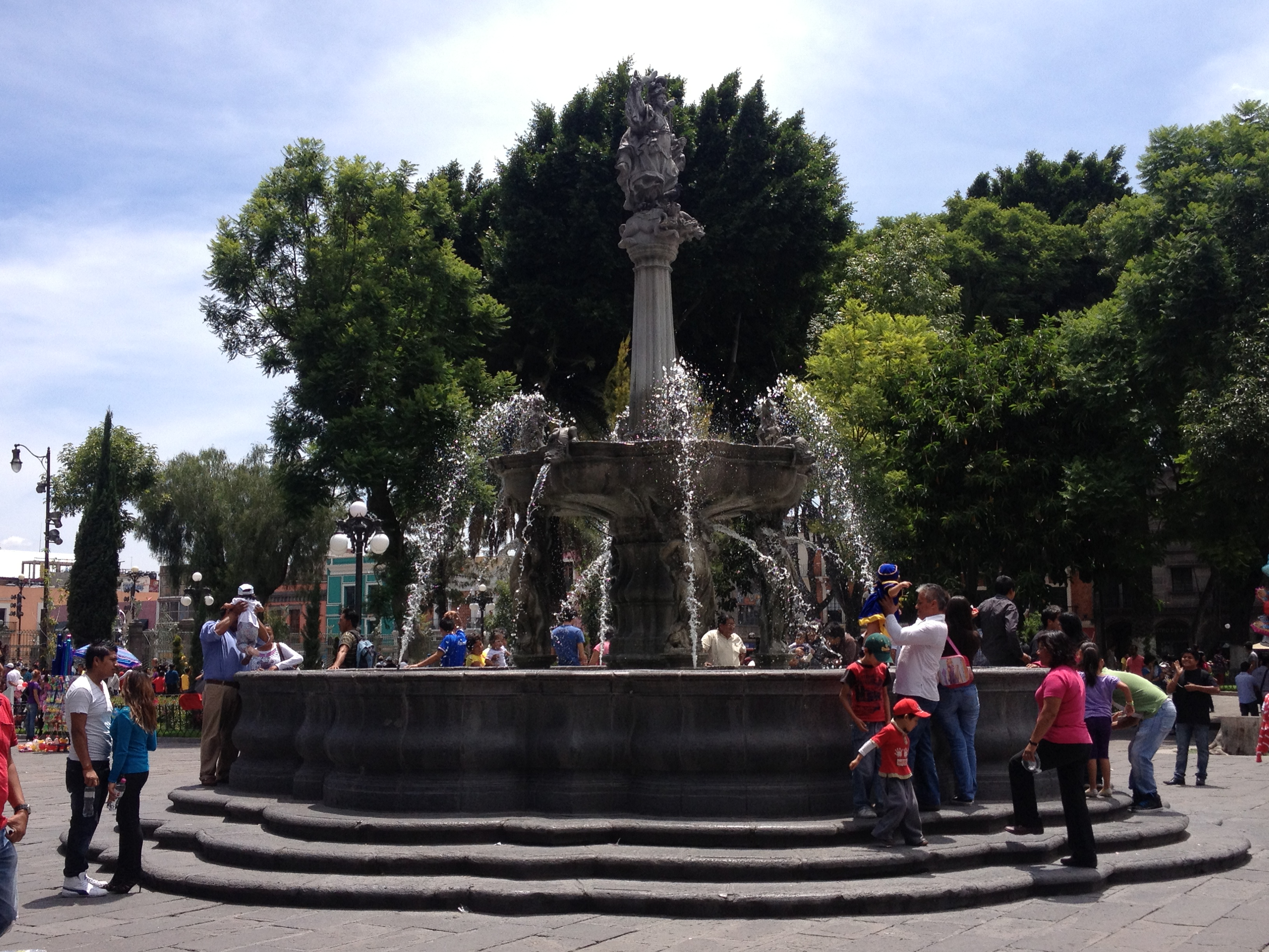 Fuente central del Zócalo de la ciudad de Puebla, Puebla, México.